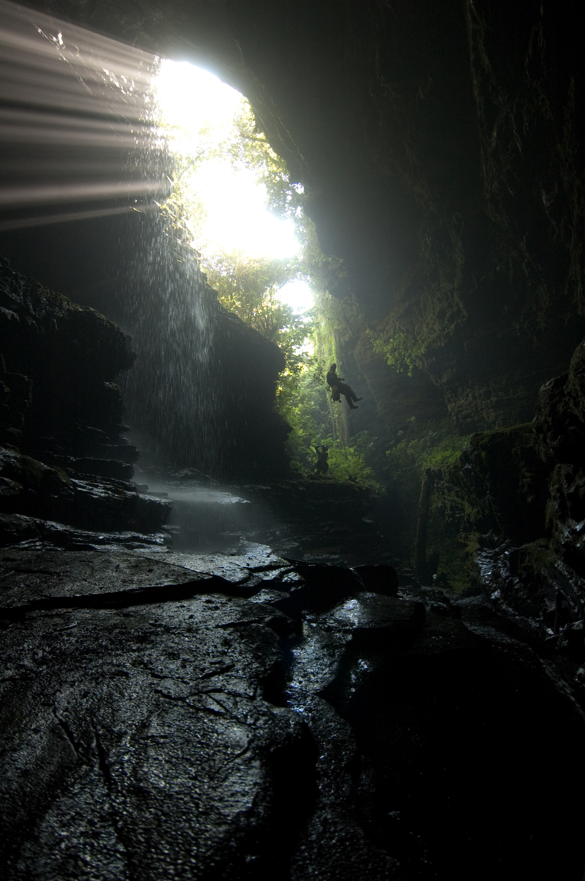 grotte mexpé 2011 traversita Mexique